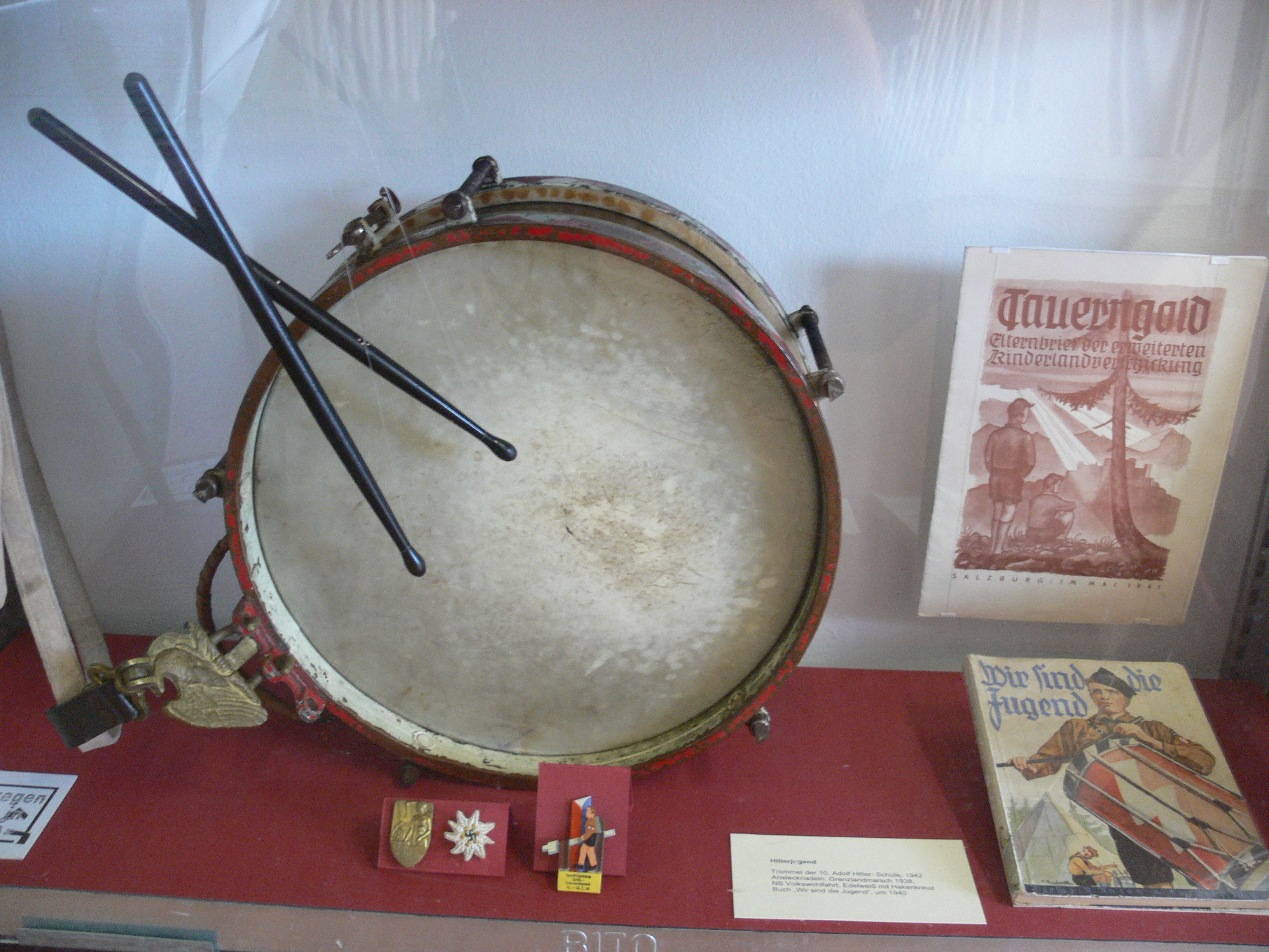 Sammlung Kindheit und Jugend (Stiftung Stadtmuseum Berlin) Ausstellungsstücke zur Hitlerjugend (Trommel, Abzeichen, Elternbrief, Buch)